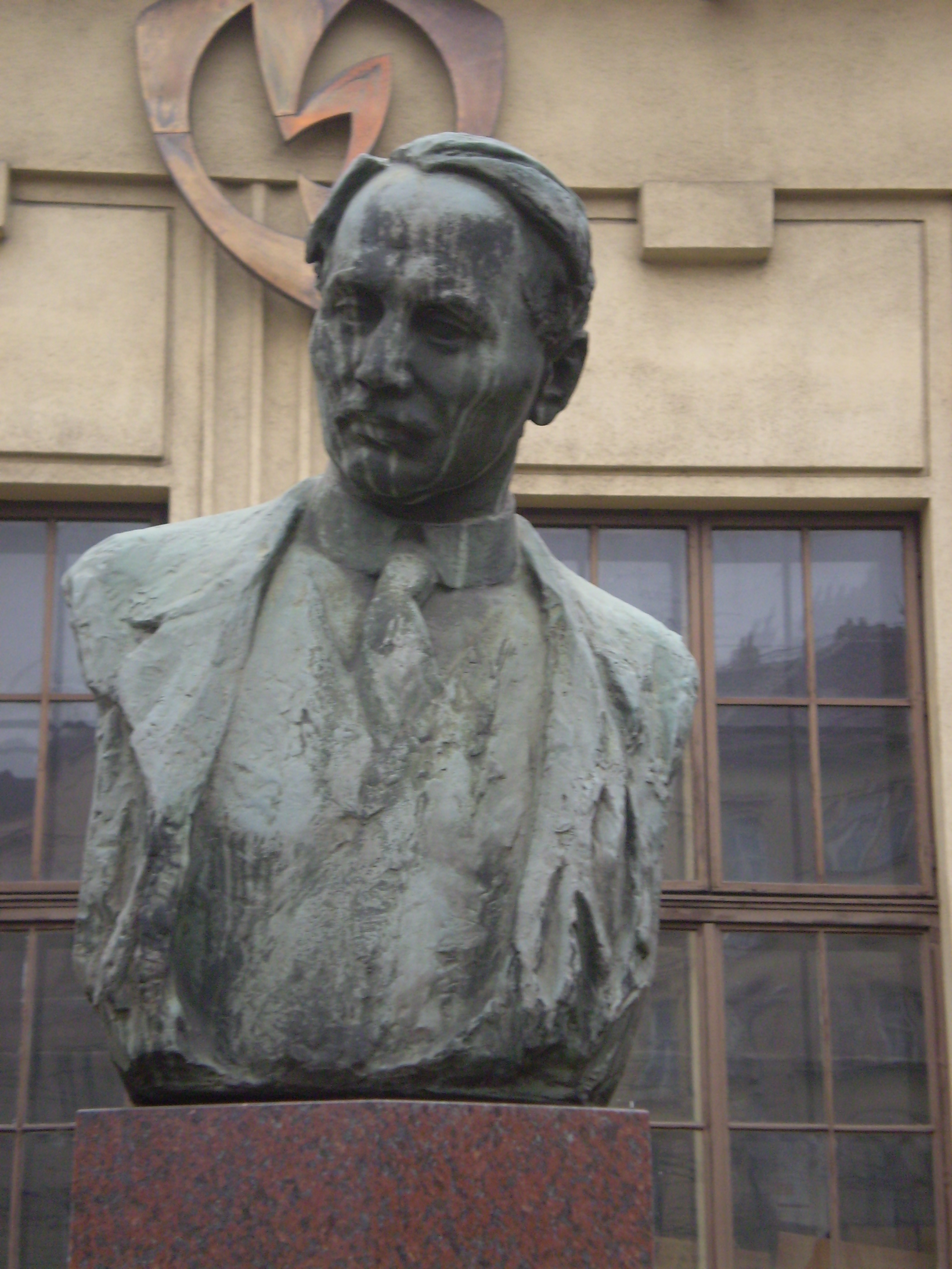 Brno, detail Victor Kaplan monument, Brno (Úvoz)